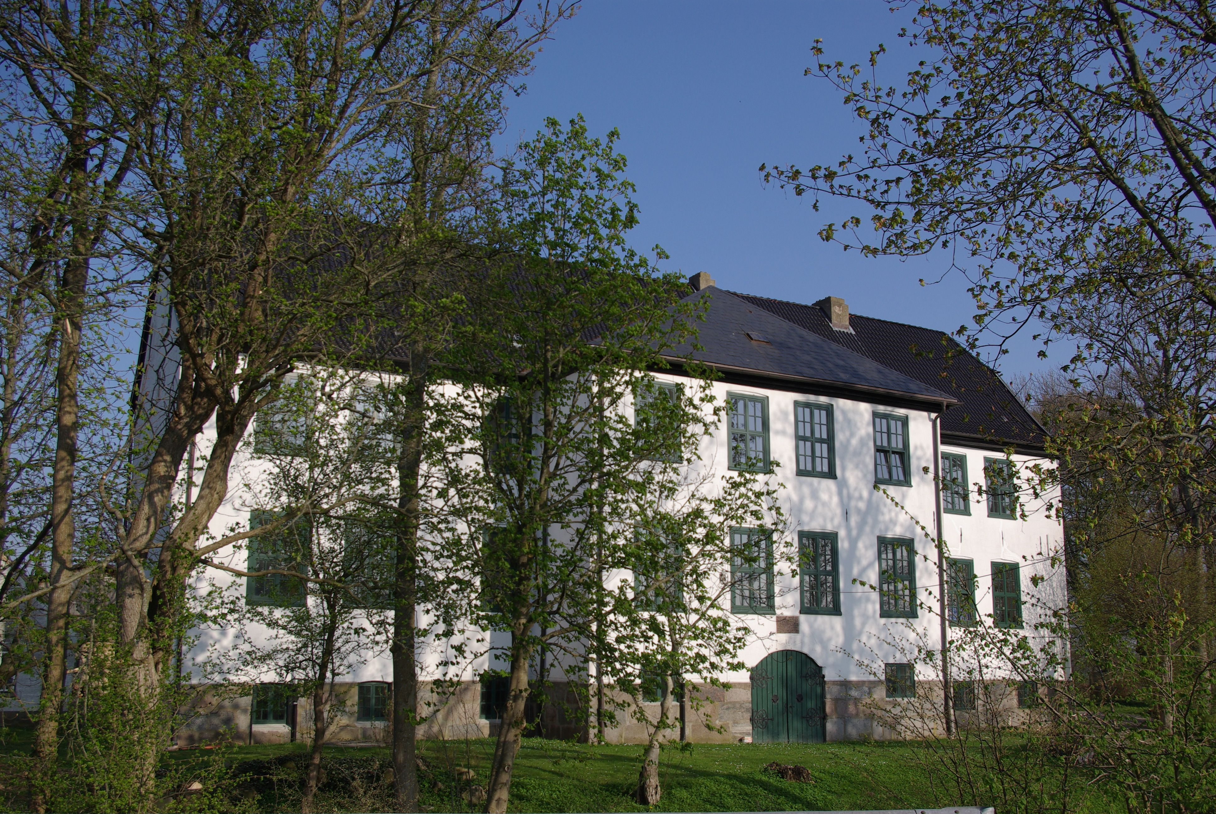 Dollrottfeld in Schleswig Holstein. Das Gut Dollrott von der westlichen Seite.